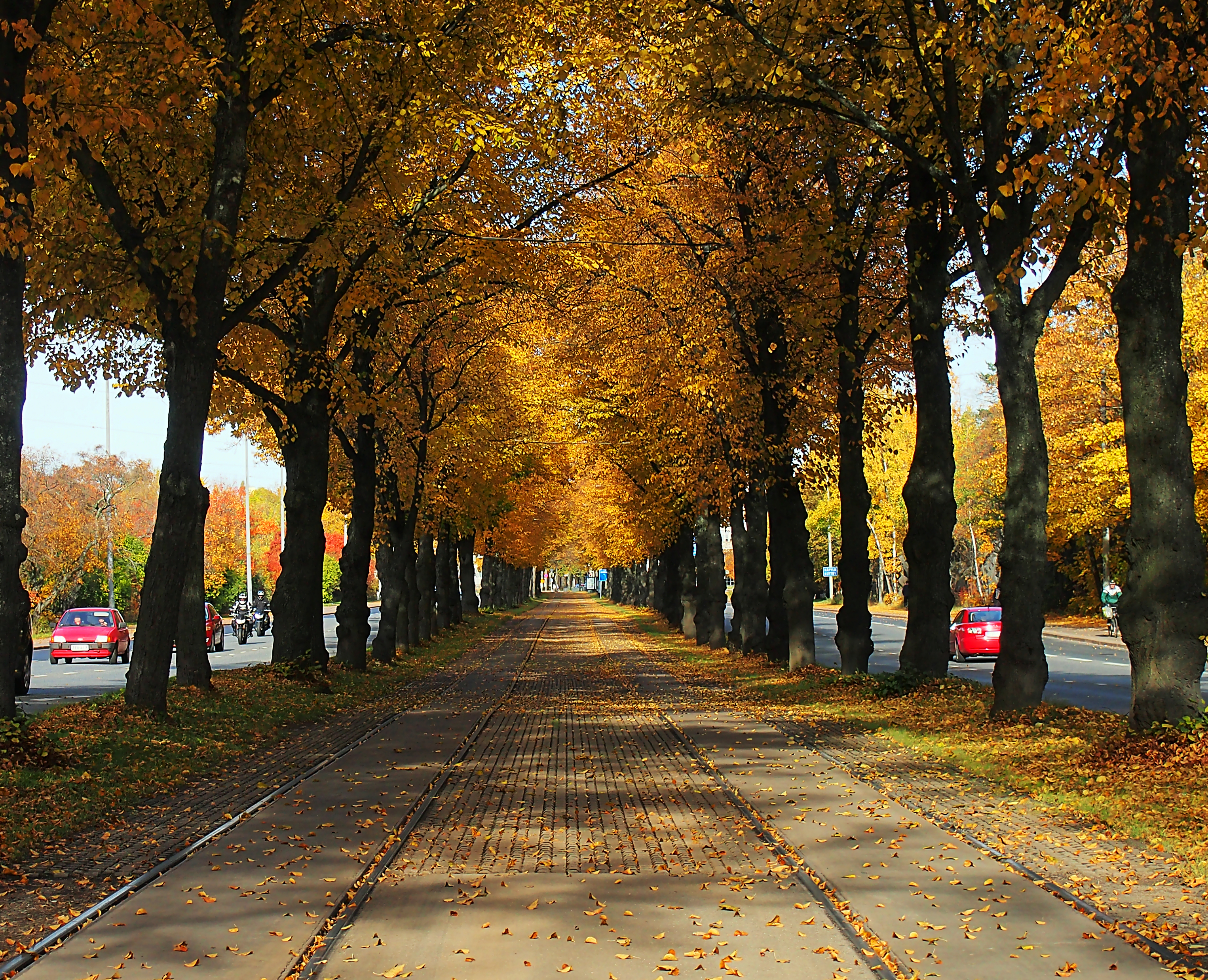 Ruskaa Mäkelänkadulla Helsingin Käpylässä.